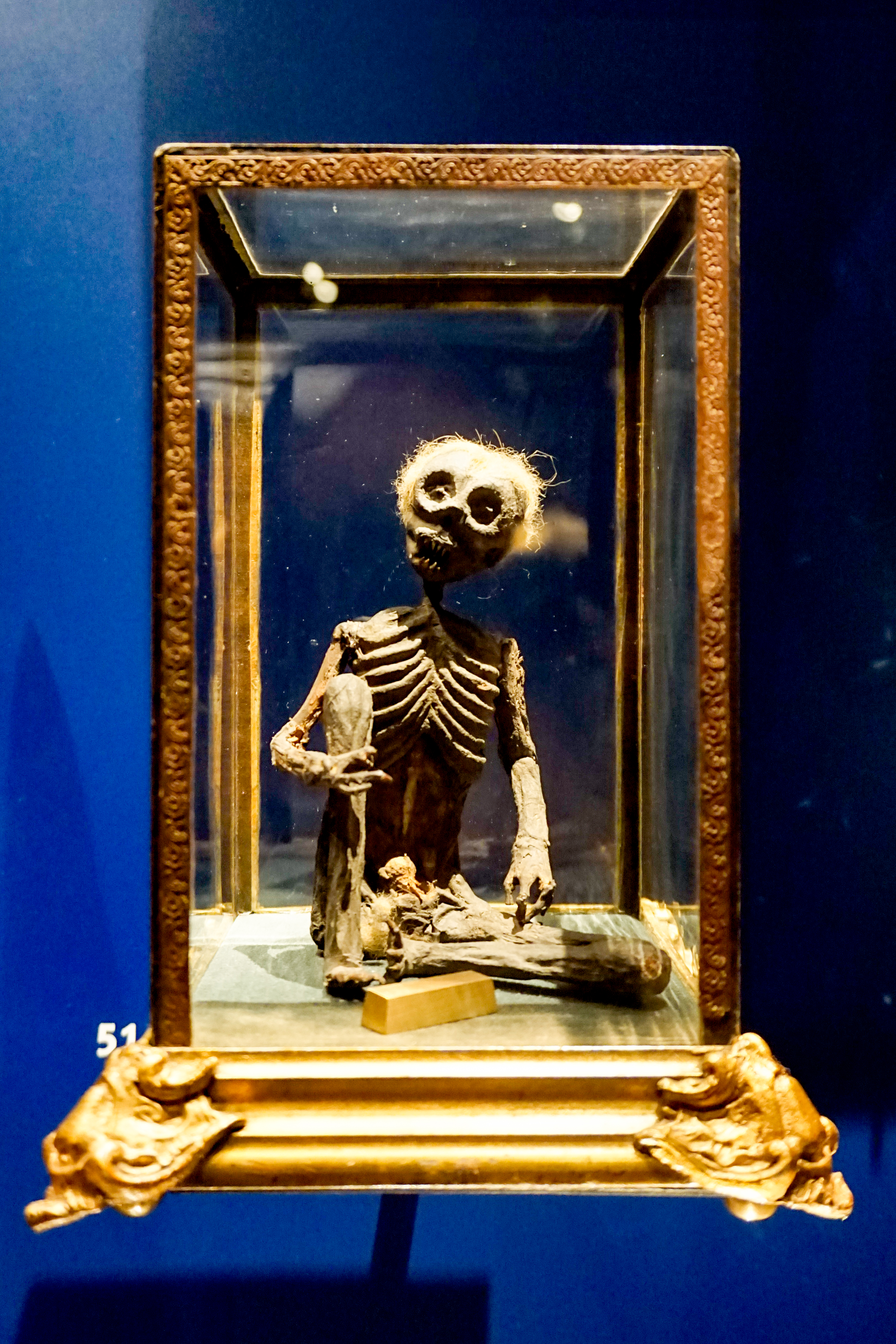 Homunculus in der Kunstkammer im Landesmuseum Württemberg, Stuttgart